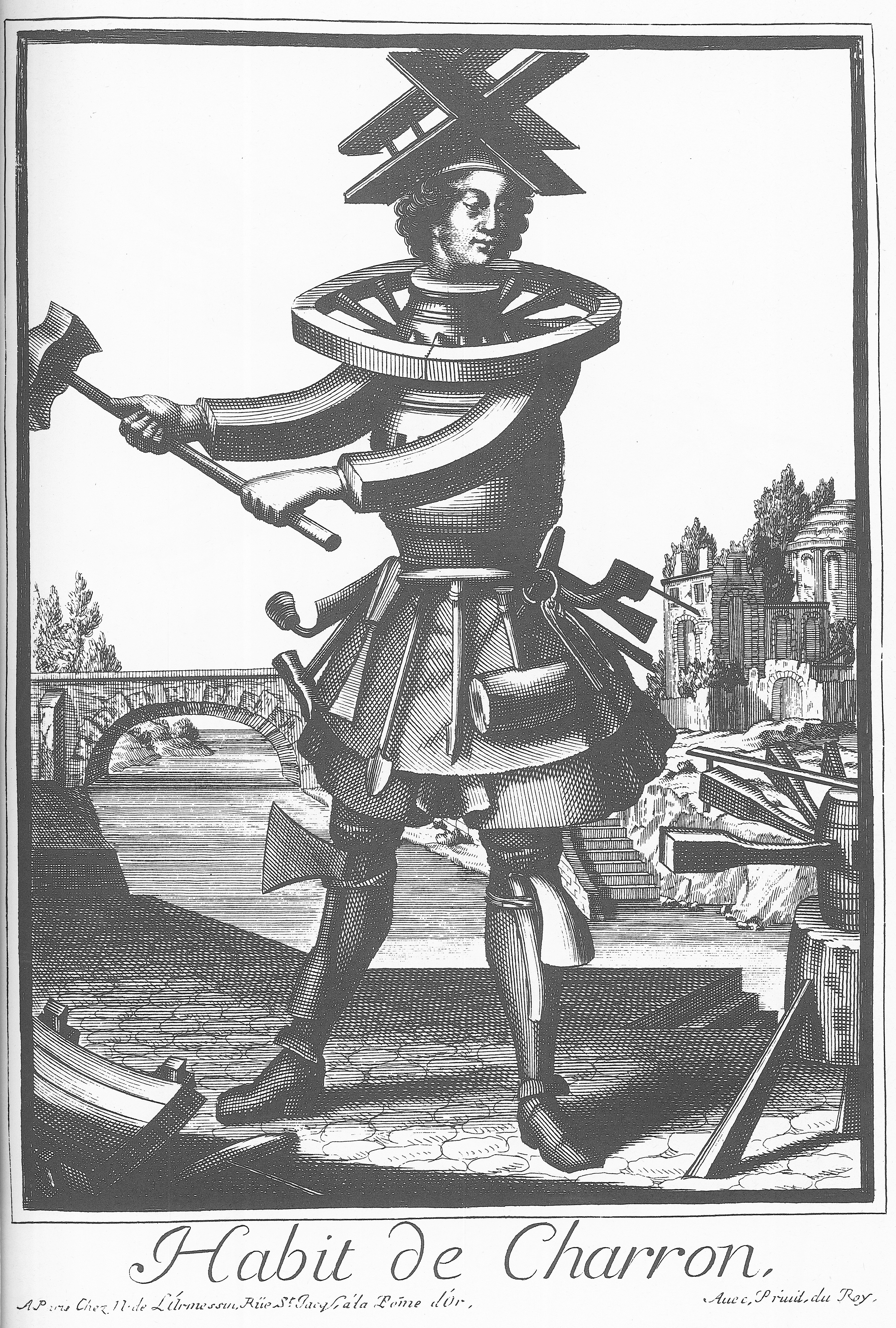 Gravure attribuée à Nicolas II de Larmessin, réalisée probablement au XVIIe siècle.